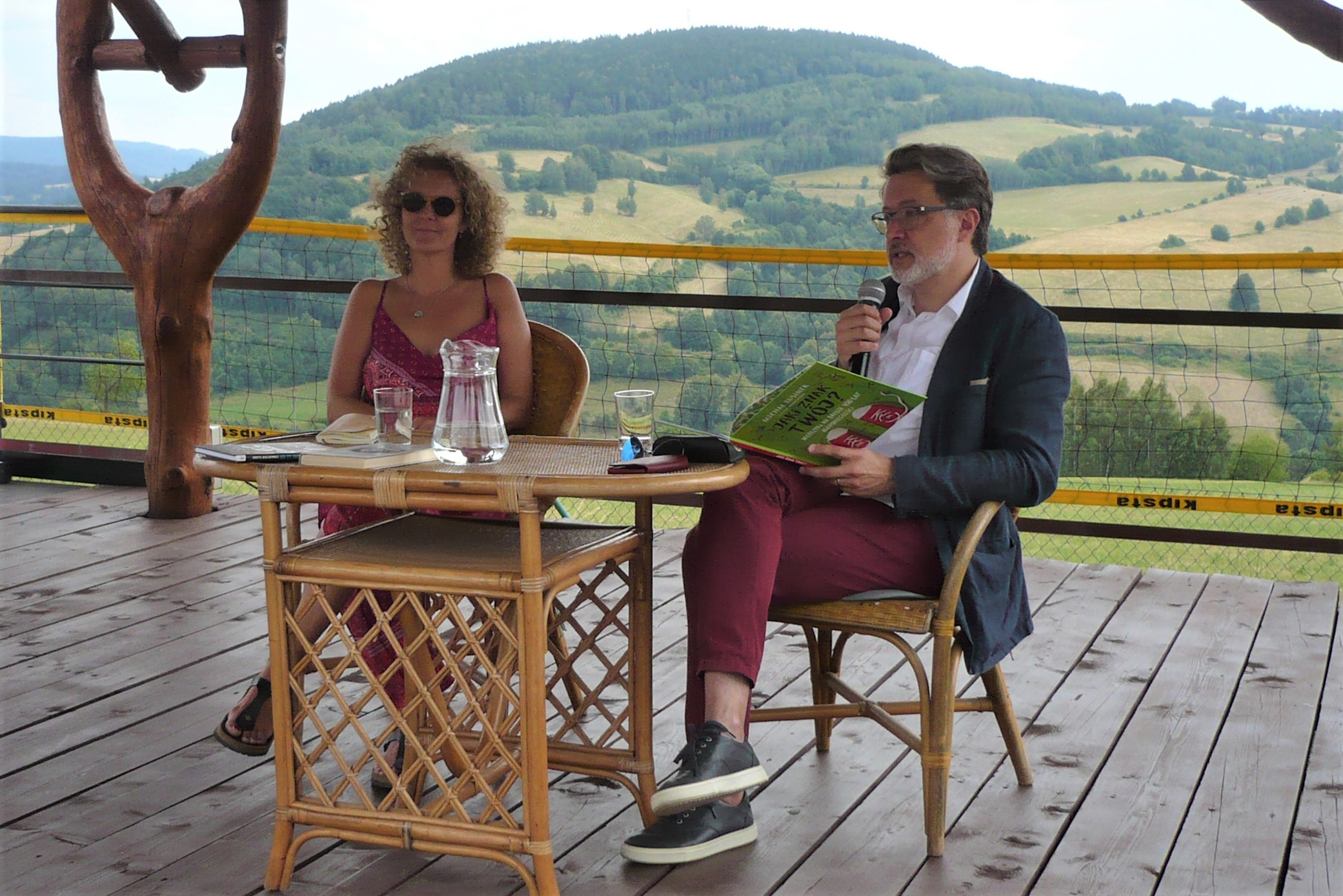 Justyna Czechowska, Michał Rusinek, Festiwal Góry Literatury, 2019